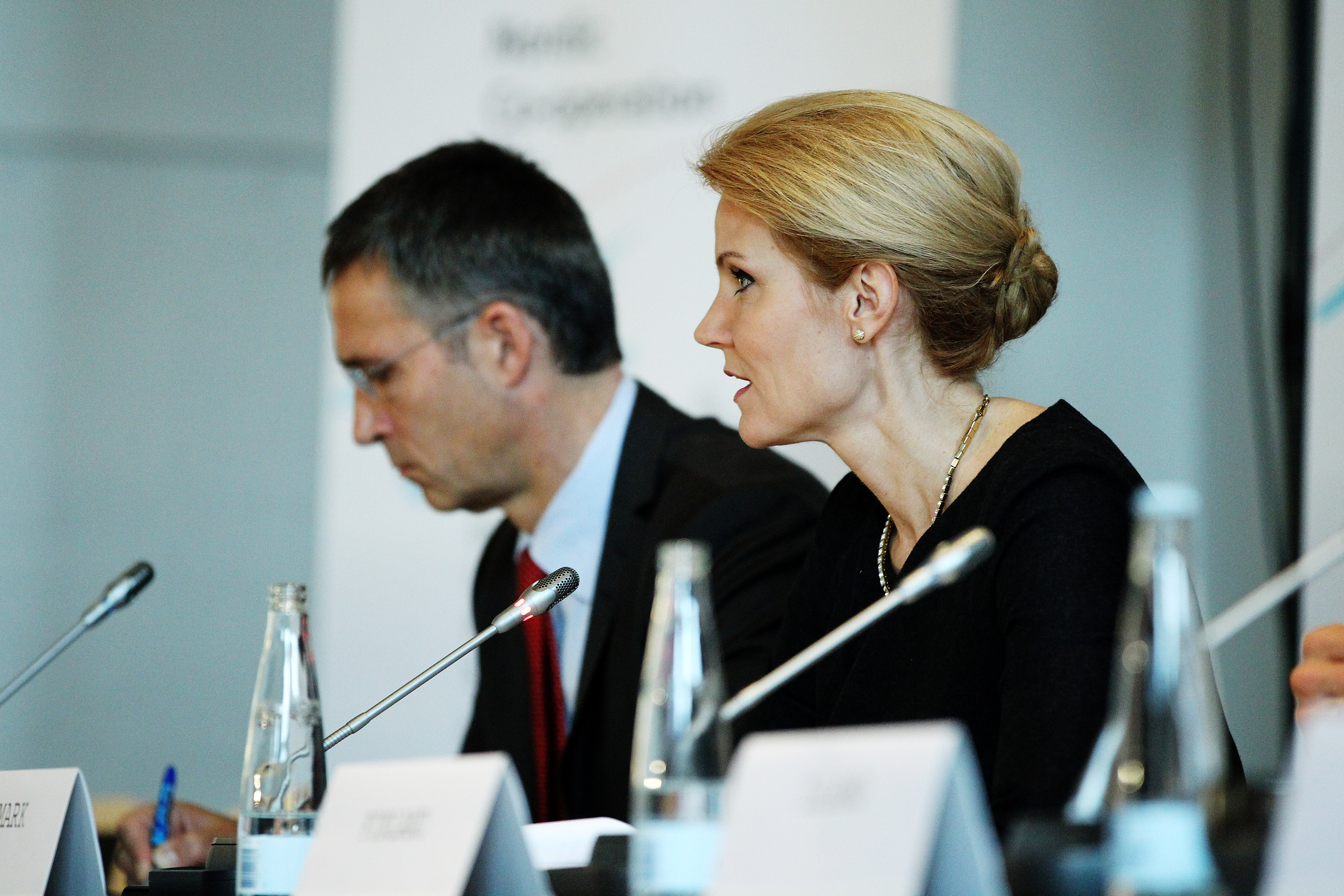 Danmarks statsminister Helle Thorning-Schmidt vid de nordiska statsministrarnas möte vid Nordiska Rådets session i Köpenhamn.